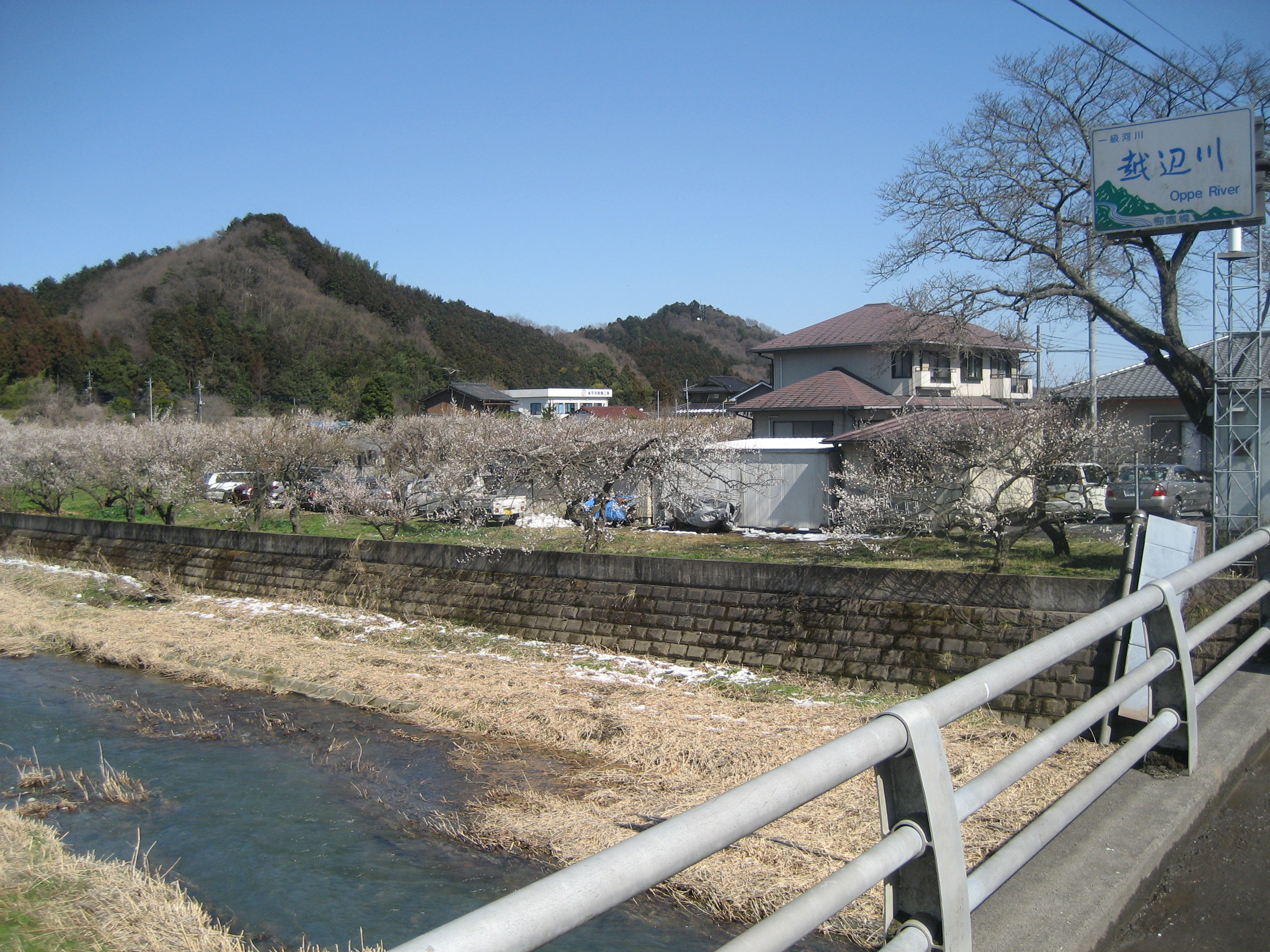 越辺川埼玉県越生町越生梅林付近